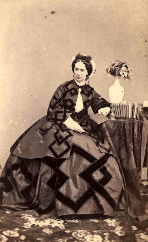 Портрет императрицы Марии Александровны. Не позднее июня 1869 Фотограф С. Л. Левицкий